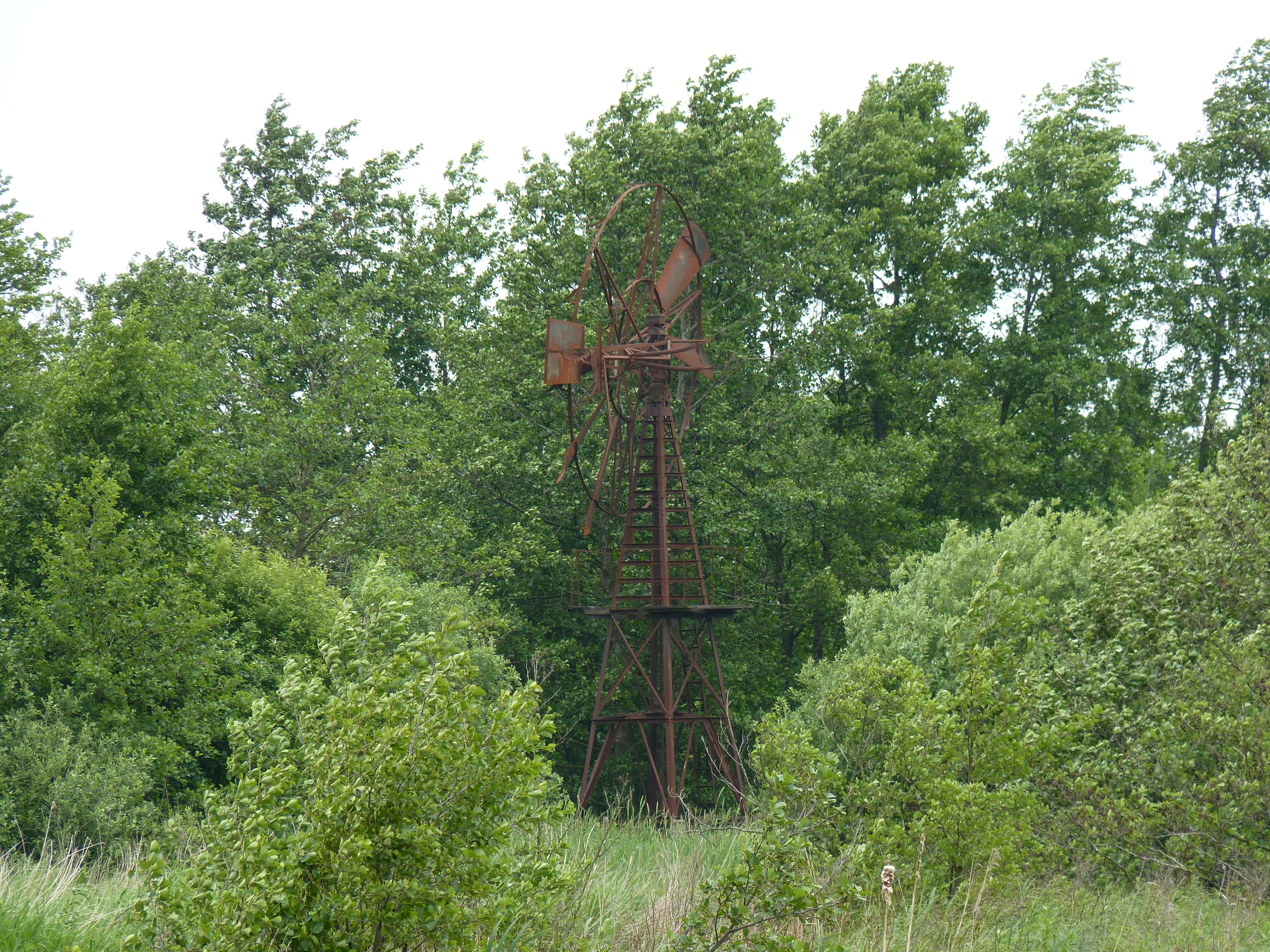 Wolvega Windmotor Lindevallei